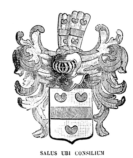 Wapenschild Esq. Rockocx